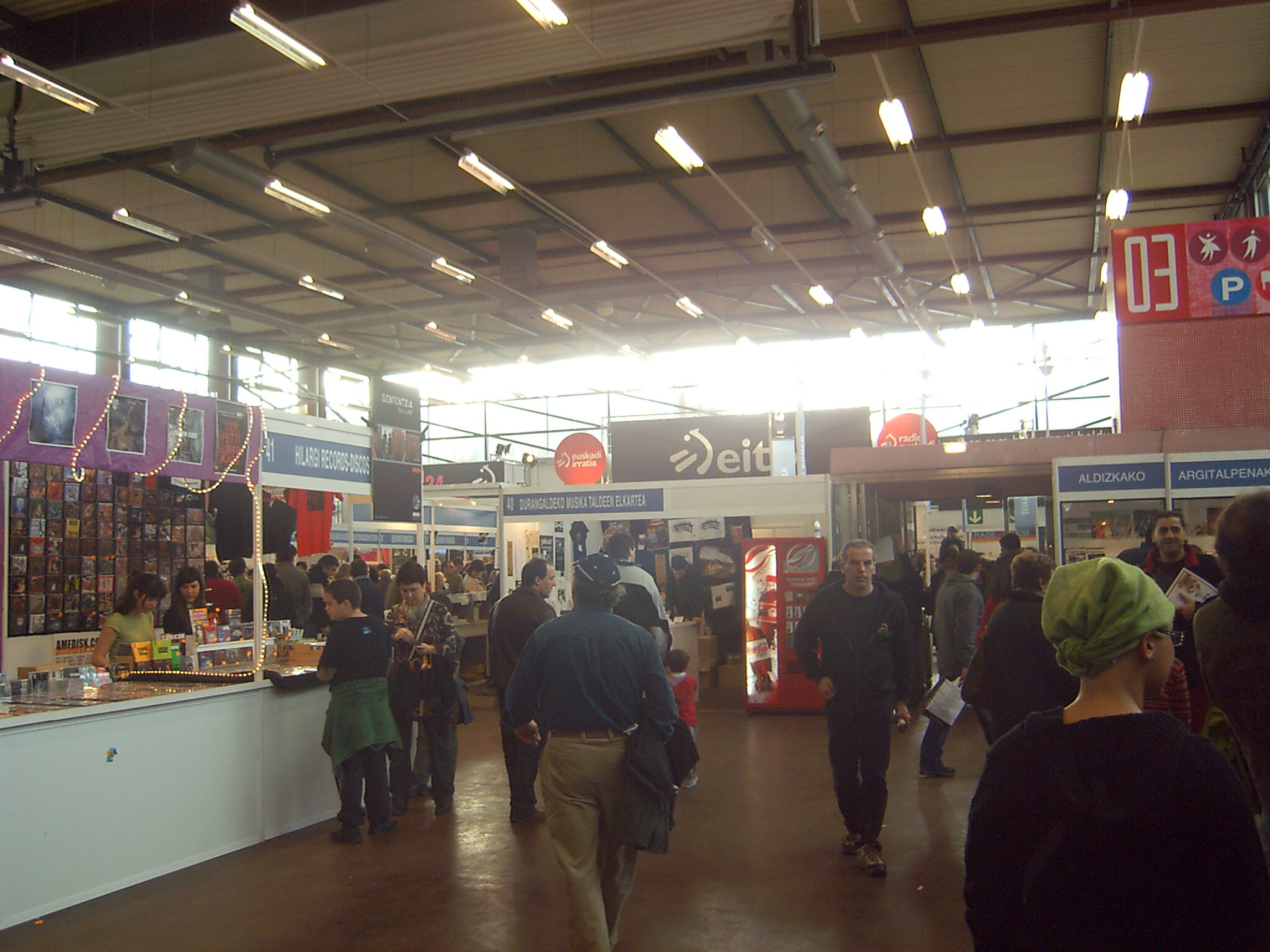 Durangoko liburu azoka